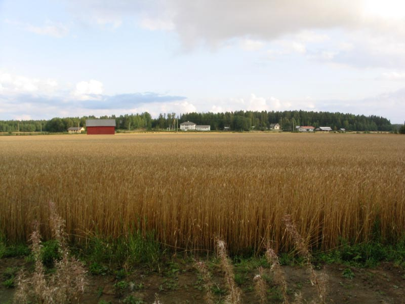 Höstbild från byn Helsingby utanför Vasa, Finland. Bilden är tagen 20.8.2003. Fotograf: Patrik Pada